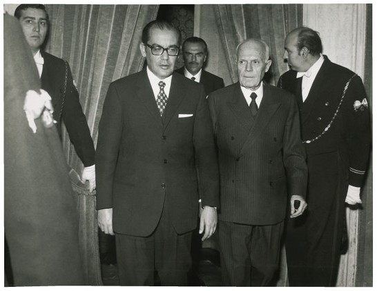 Il presidente della Camera dei Deputati Alessandro Pertini riceve il presidente della Commissione Europea Franco Maria Malfatti